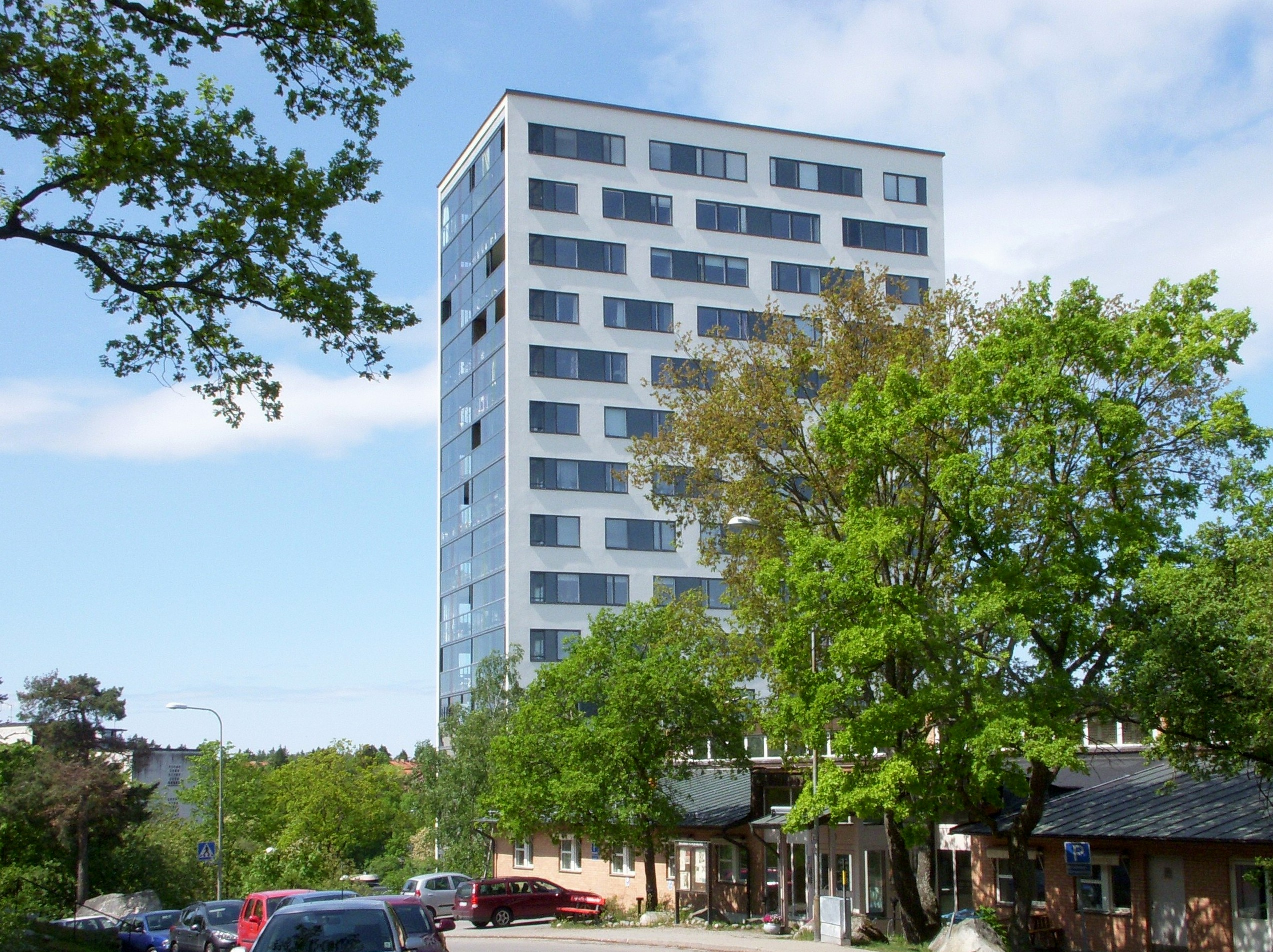 Flerbostadshuset Brommahöjden i Bromma